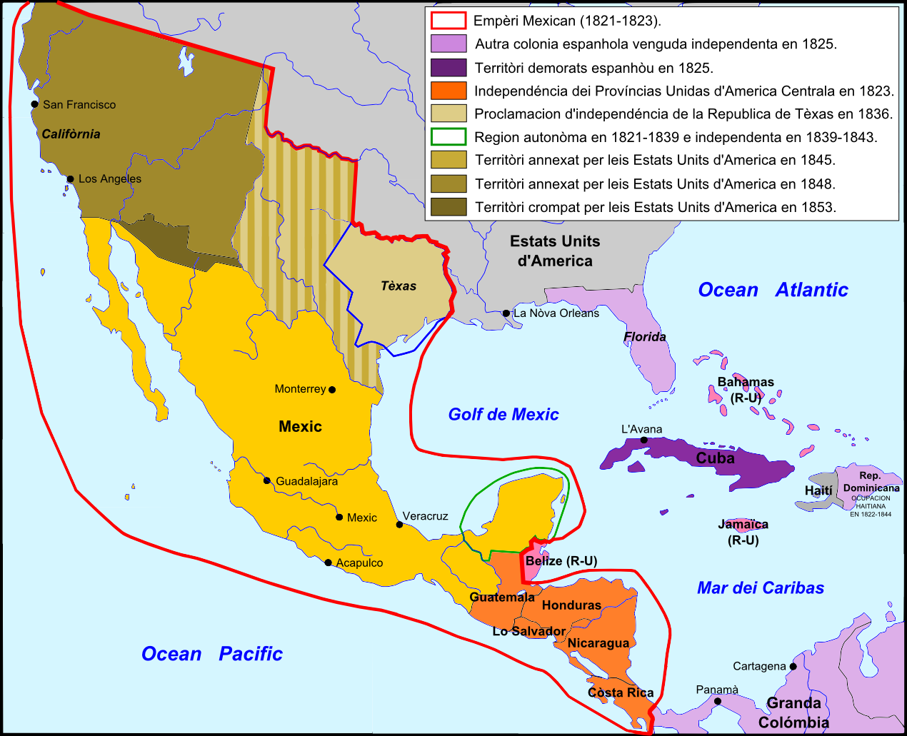 Pèrdas territòrialas dins lo corrent dau sègle XIX.